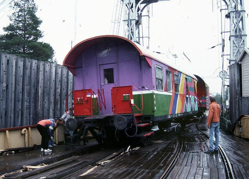 Vogn fra Sesamtoget avsporet på fergen Storegut på Tinnsjøen.